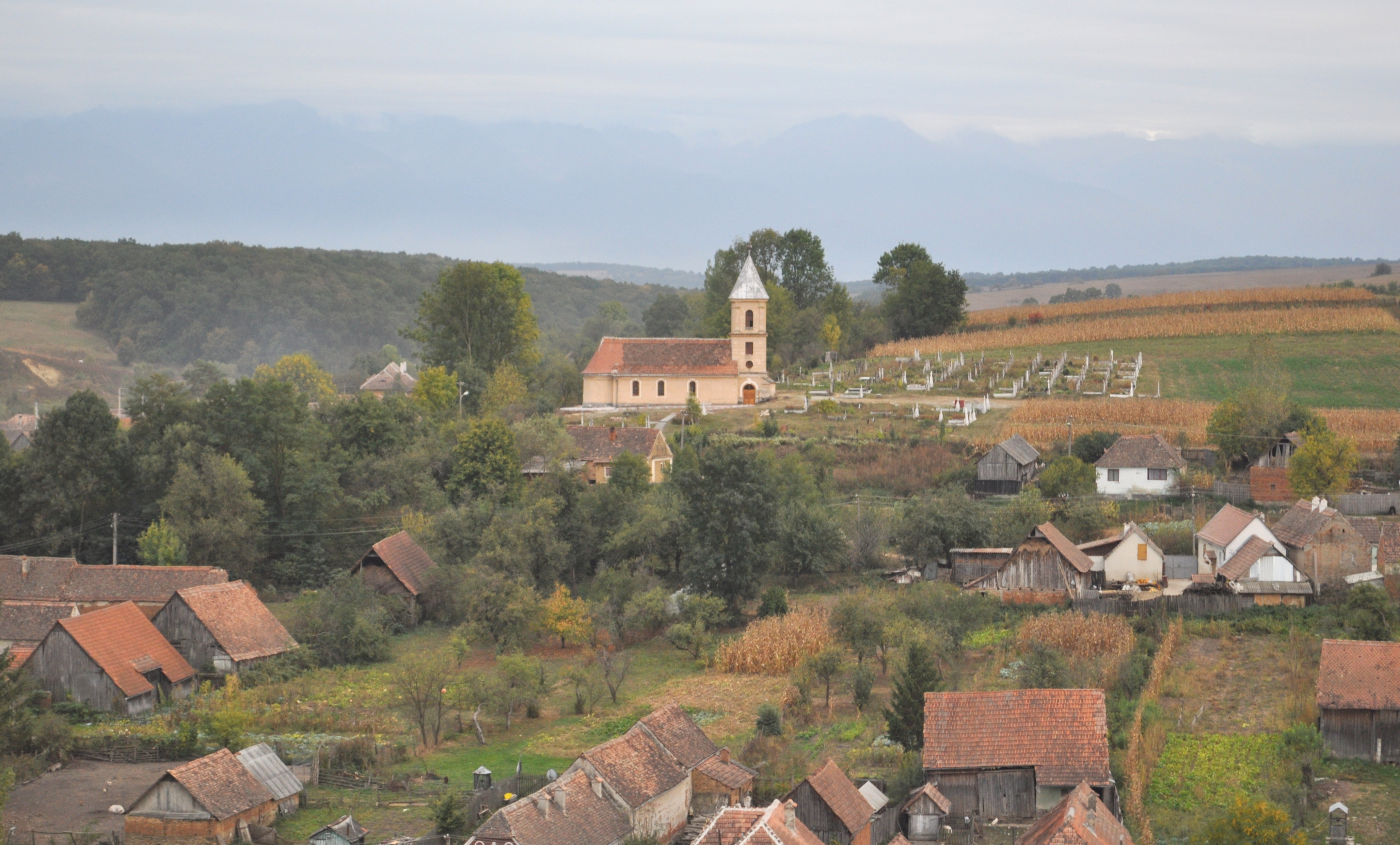 Biserica Înălţarea Domnului din Chirpăr